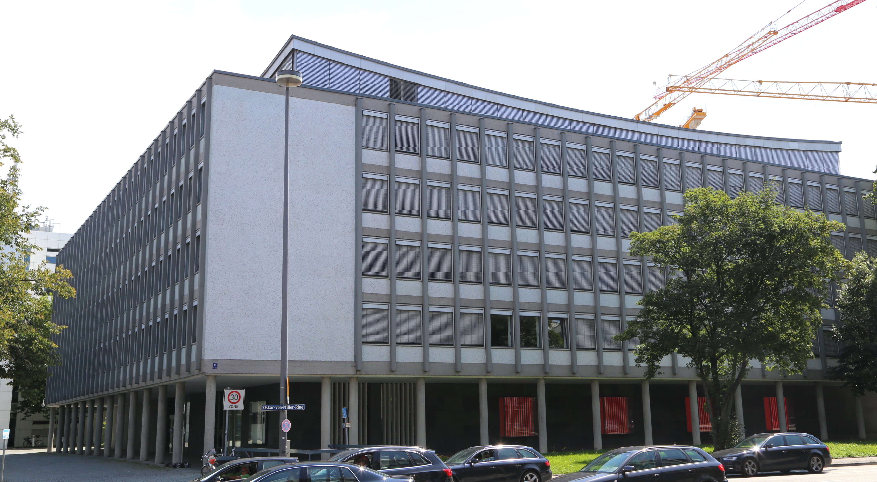 Jägerstraße 8; Oskar-von-Miller-Ring 18; Verwaltungsgebäude der Siemens AG, Stahlbetonskelettbau mit zurückgesetztem fünftem Obergeschoß und konkav geschwungenem Dach in städtebaulicher Ecklage am neu angelegten Oskar-von-Miller- Ring, über quadratischem Grundriss um einen Innenhof errichtet, mit Arkadengänge zur Straße, Fassadengliederung durch vor die Fensterflucht gestellte Stahlbetonpfeiler und in diese sichtbar eingespannte Geschossdecken, Fassadenflächen aus Sichtbeton und weißer Glasmosaikverkleidung, von Eduard von der Lippe und Hans Maurer, 1954–56.